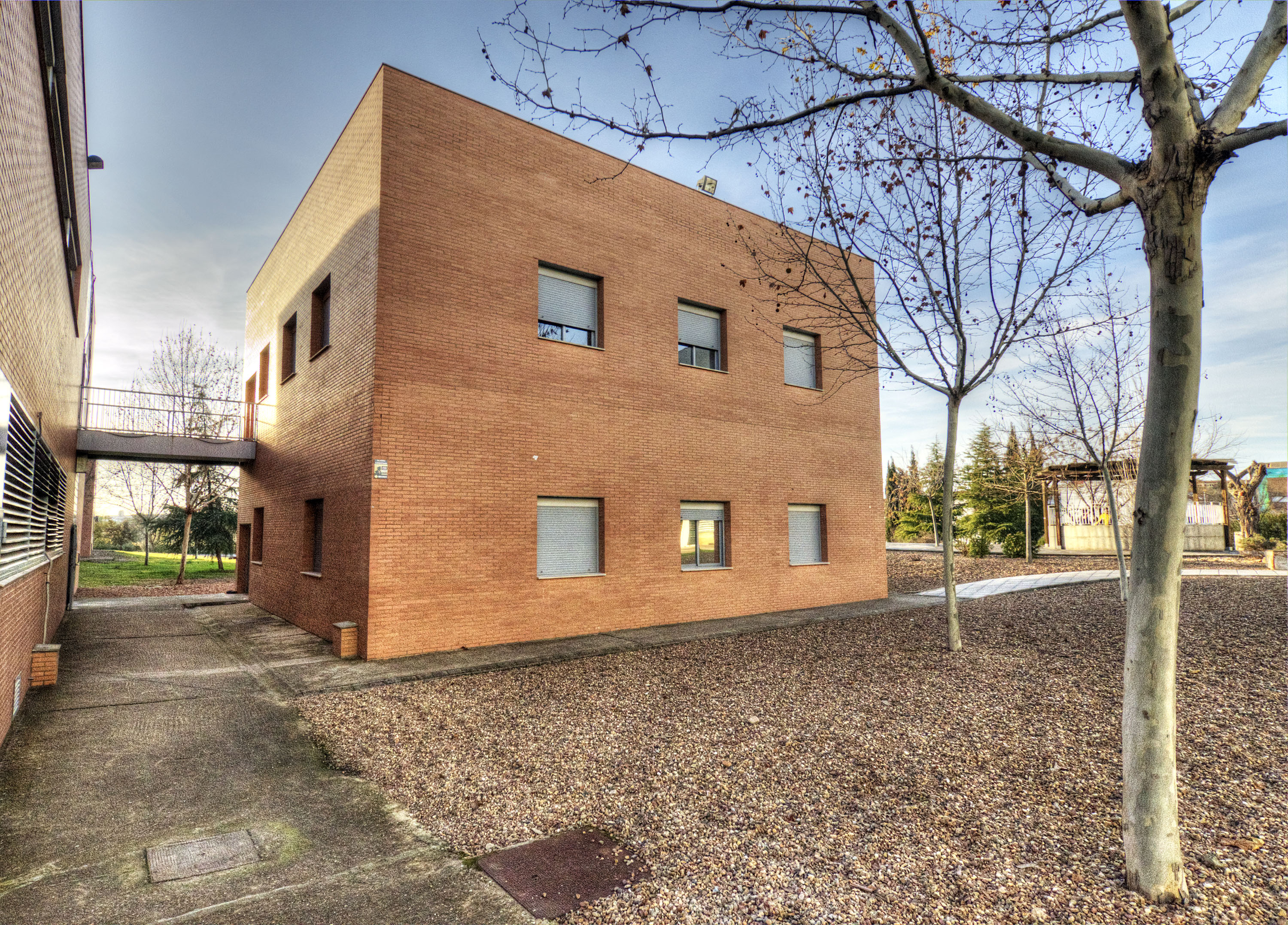 Centro Universitario de Mérida - Edificio de grupos de investigación